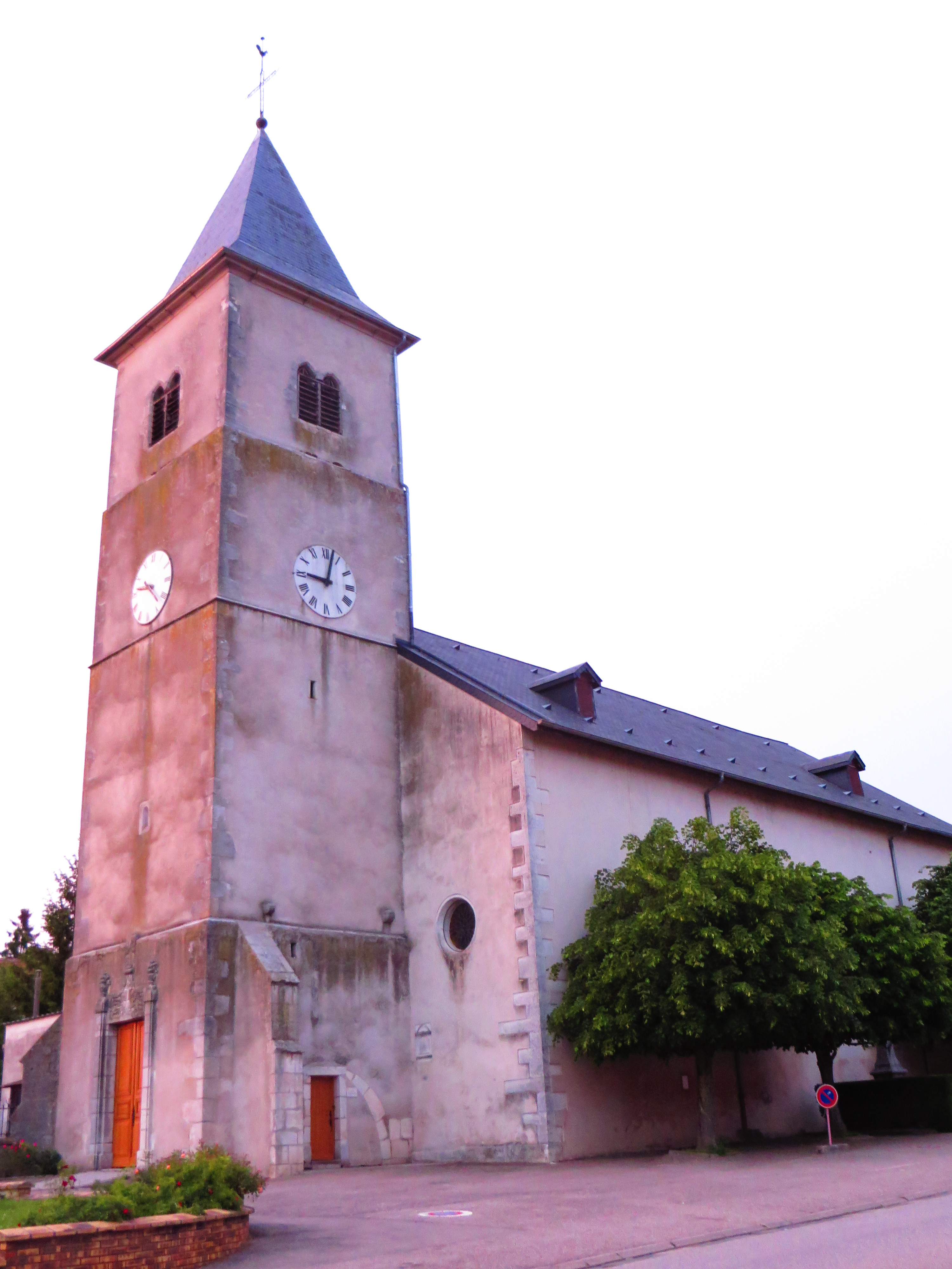 Ceintrey eglise